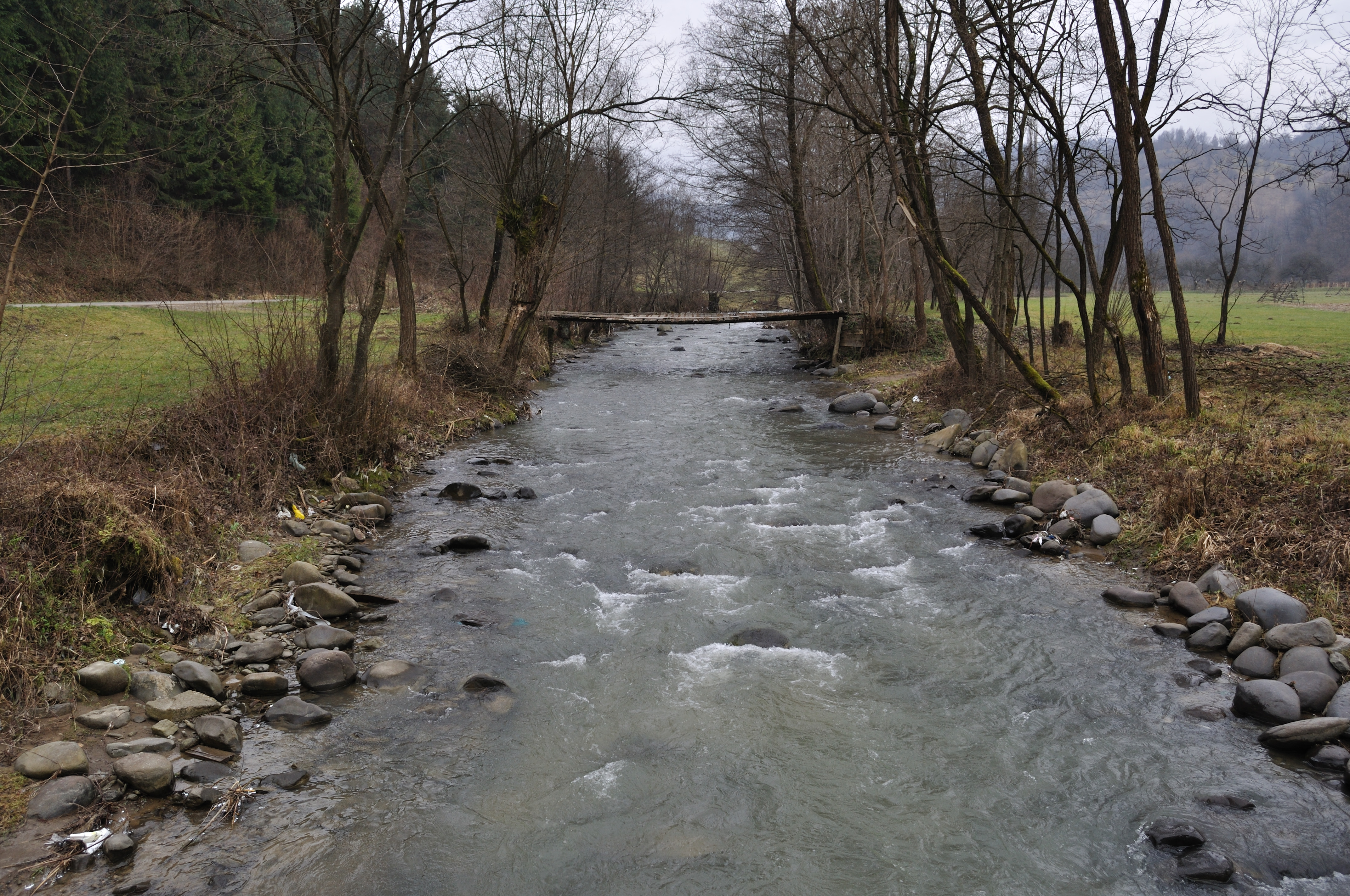 Râul Botiza